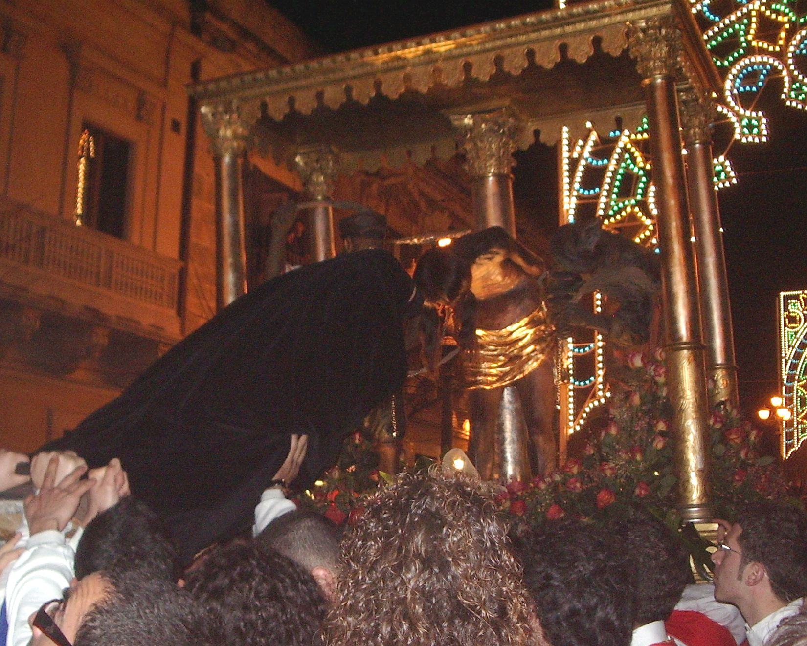 Foto Personale: F.Tumino